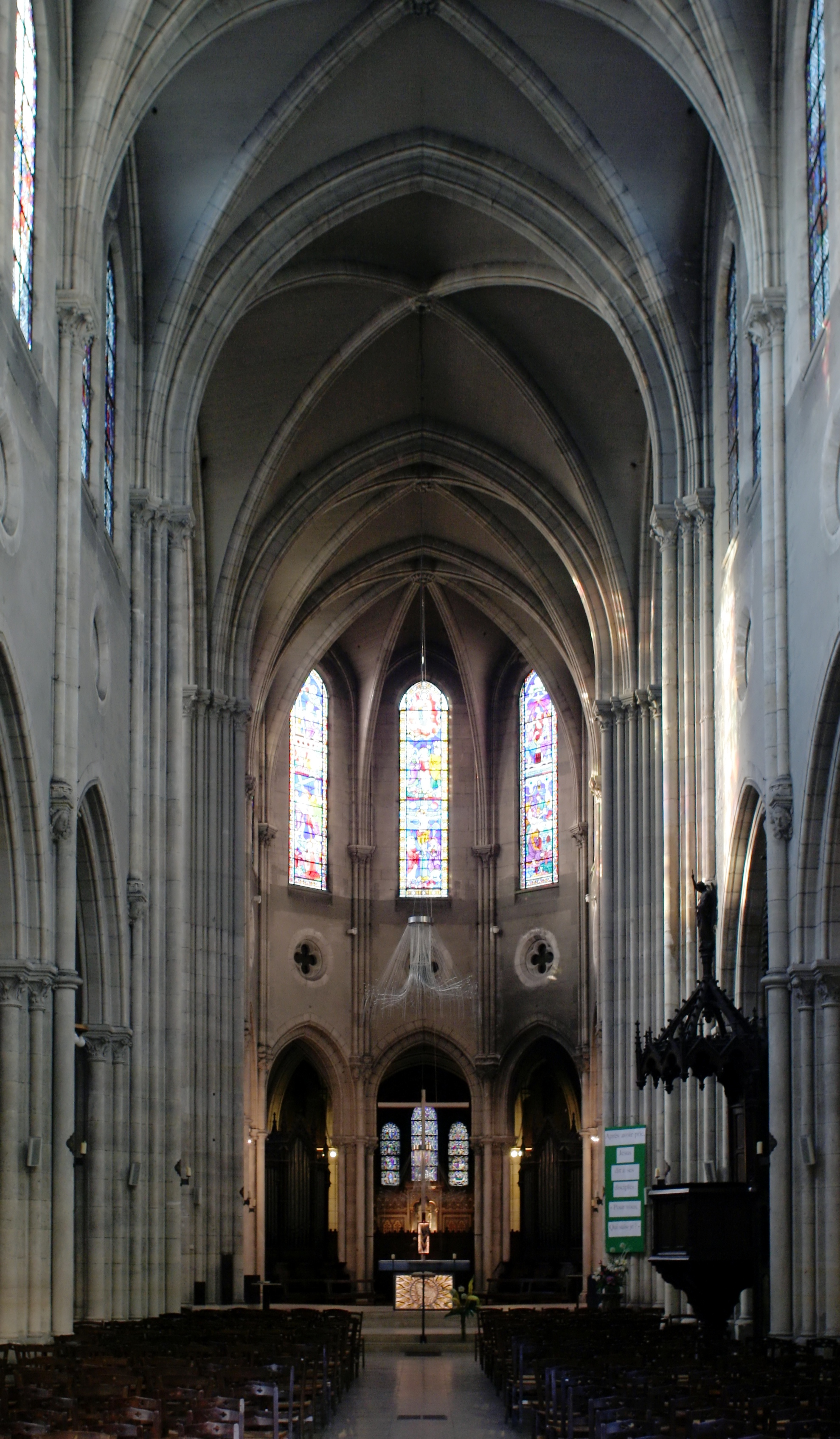 Église Saint-Jean-Baptiste de Belleville, Paris 19e arrondissement. Vue de la nef et du chœur repuis le portail d'entrée.